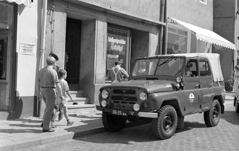 11.-18.8.1991 Bundesland Sachsen-Anhalt Naumburg, sowjetisches Militärfahrzeug